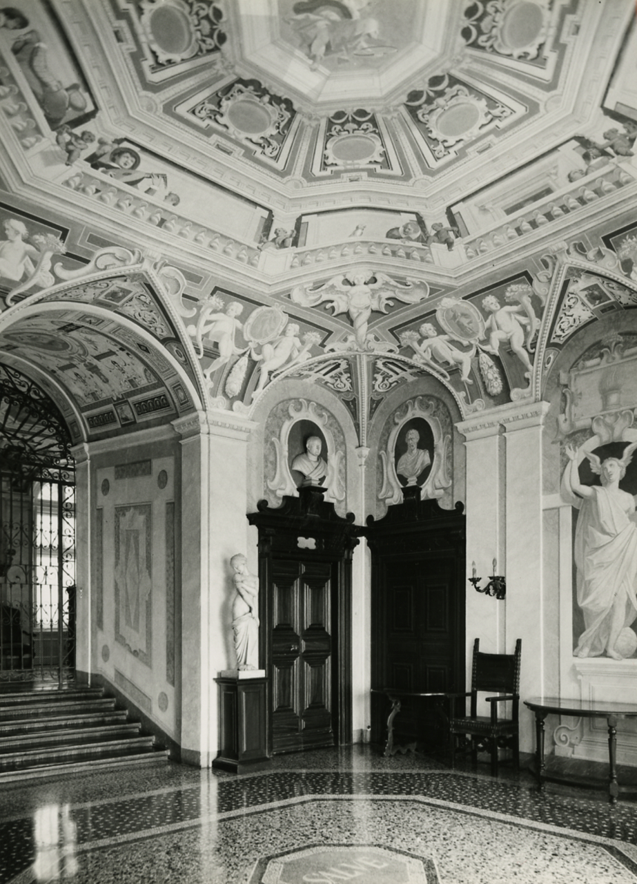 Riviera di Levante. Genova. Albaro. Villa Saluzzo, Bombrini detta il Paradiso. Esterni e interni. Servizio fotografico : Genova, 1963 / Paolo Monti. - Stampe: 3 : Positivo b/n, gelatina bromuro d'argento/ carta, 24x30. - ((Al verso delle stampe manoscritti i numeri dei negativi corrispondenti: 6340, 6344, 6347; iscrizione documentaria manoscritta a matita: "30/05/63"; timbro a inchiostro con data e copyright: "© Copyright/ Credit to/ Paolo Monti/ Corso Sempione [...]/ Milano". - Sul coperchio della scatola iscrizione didascalica manoscritta a pennarello nero: "Genova/ Bologna". - Il negativo identificato con il numero 46397 è stato realizzato per Zodiac. - Occasione: Documentazione per la pubblicazione: Italia Nostra (a cura di), "Le ville genovesi", catalogo della mostra, Genova 1962, Genova, Comune di Genova, 1967. - Fonte: Monografia di Italia Nostra (a cura di): Le ville genovesi, catalogo della mostra, Genova 1962, Genova, Comune di Genova (1967). - Fonte: Lettera di Paolo Monti: I. Carteggi/ Genova - Enrico (1963-1966), presso Archivio Paolo Monti. Camicia con documenti dattiloscritti e manoscritti vari relativi al lavoro eseguito per Italia Nostra: preventivi, lettere, inventari. - Fonte: Agenda di Paolo Monti: R 1 - Monti/ 1 aprile 1963 - 6 giugno 1964/ 6000-8193 (1963-1964), presso Archivio Paolo Monti. - Fonte: Agenda di Paolo Monti: Monti/ 2/ 6 giugno 1964 - 31 marzo 1966/ 8194-12420 (1964-1966), presso Archivio Paolo Monti